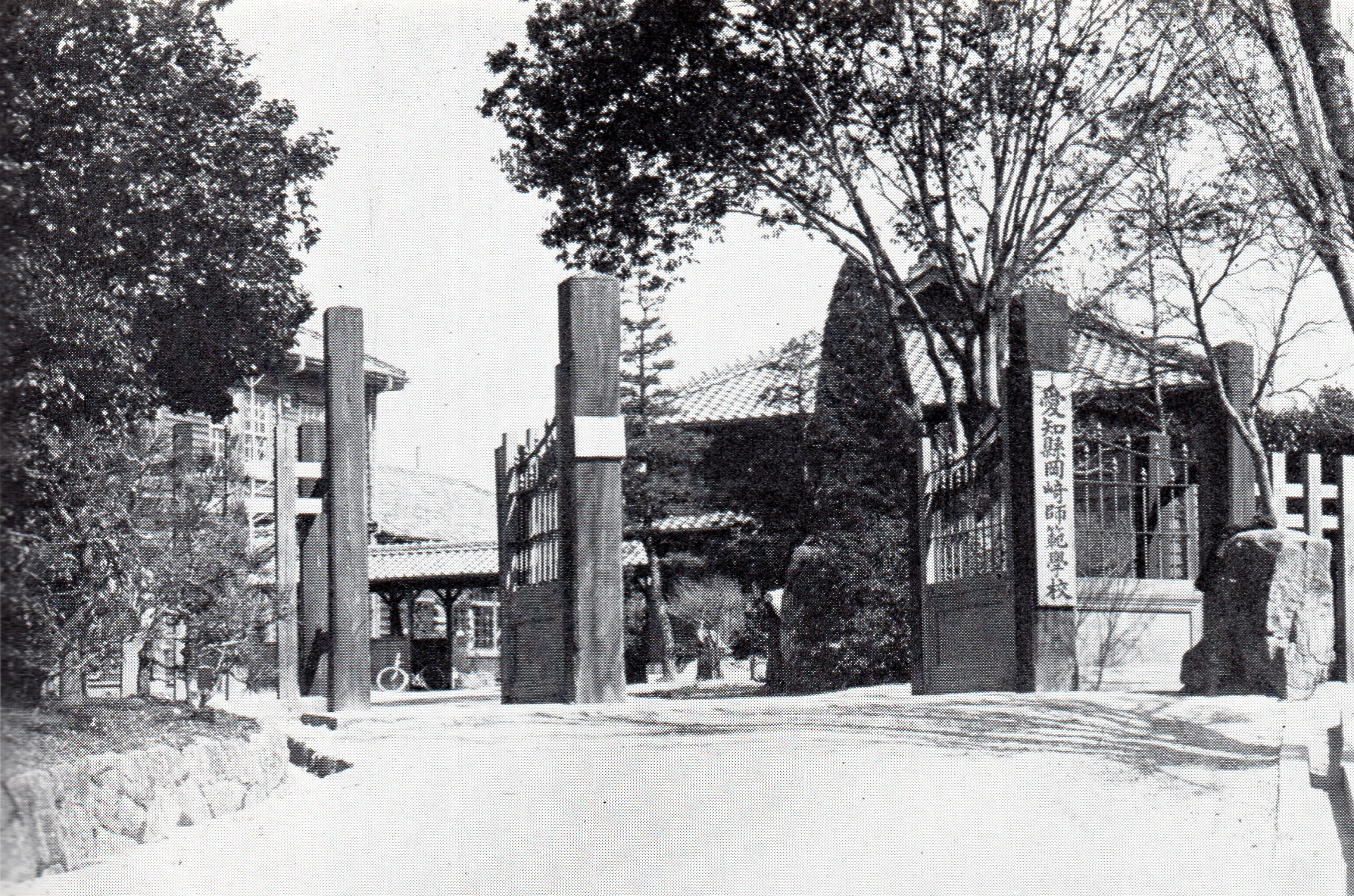 愛知県岡崎師範学校（1943年に愛知第二師範学校に改称）